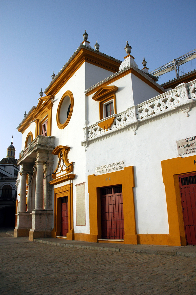 Maestranza de Sevilla